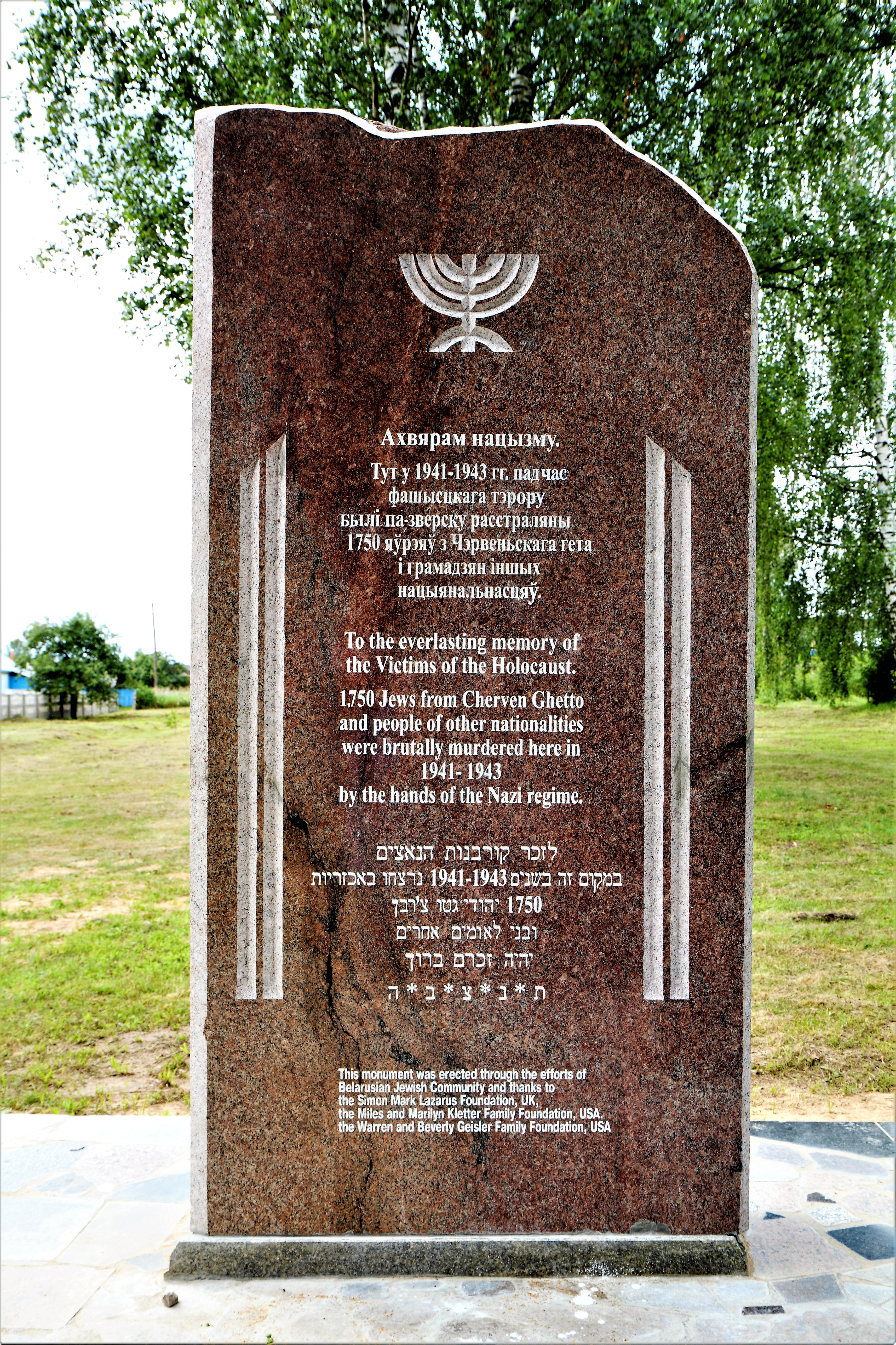 Памятник на месте массового убийства 1750 евреев Червеньского гетто в 1941-1943 годах на еврейском кладбище города (напротив дома № 68 по улице Минской). Установлен в 2012 году.